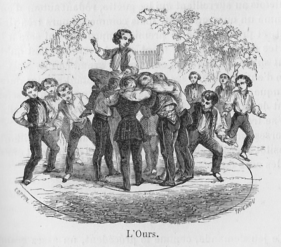 Gravure représentant des adolescents jouant au jeu de l'ours.